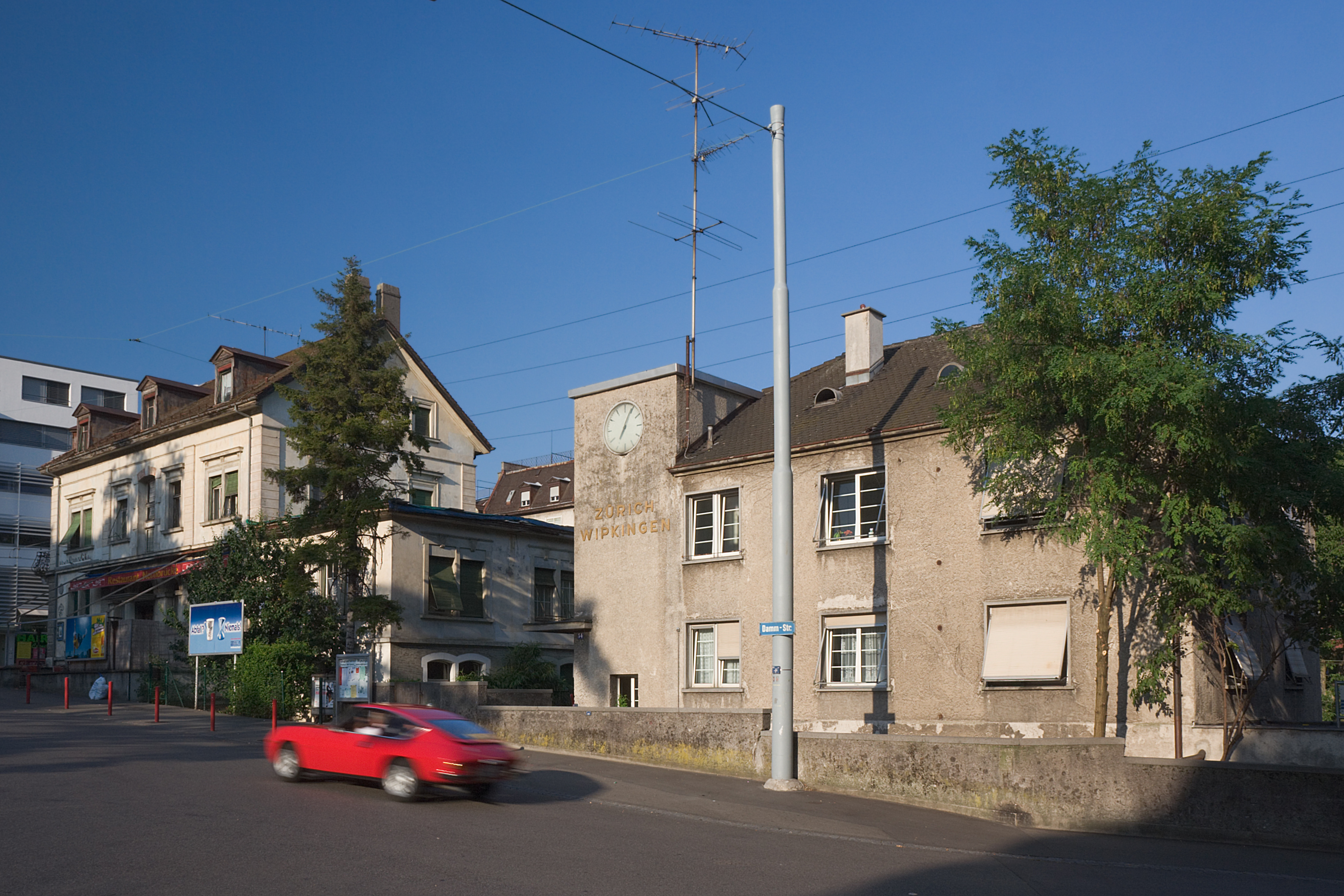 Der Bahnhof Zürich Wipkingen vom Röschibachplatz gesehen, Schweiz Links im Bild das Restaurant Nordbrücke